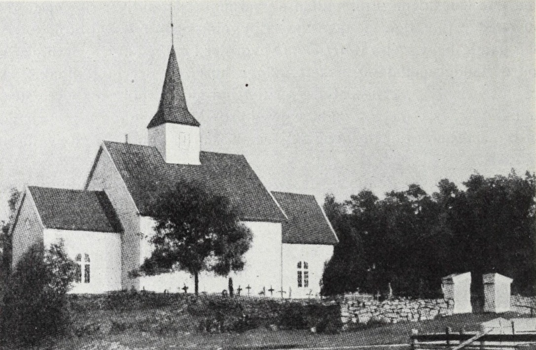 Stokkes middelalderkirke. Fra Lorens Berg: «Stokke: En bygdebok» (Oslo, 1928), s. 86.